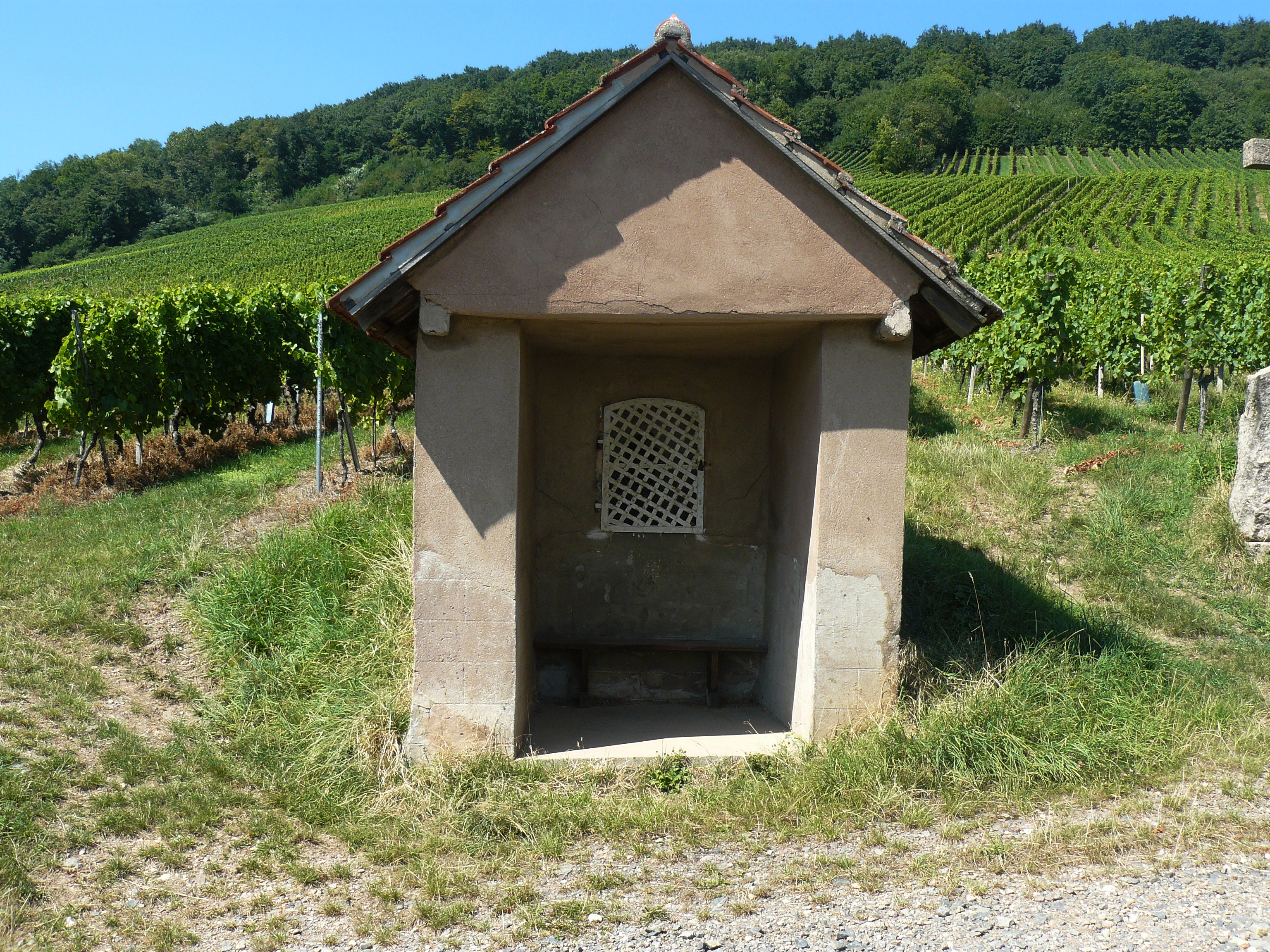 Oratoire de Saint-Ubain